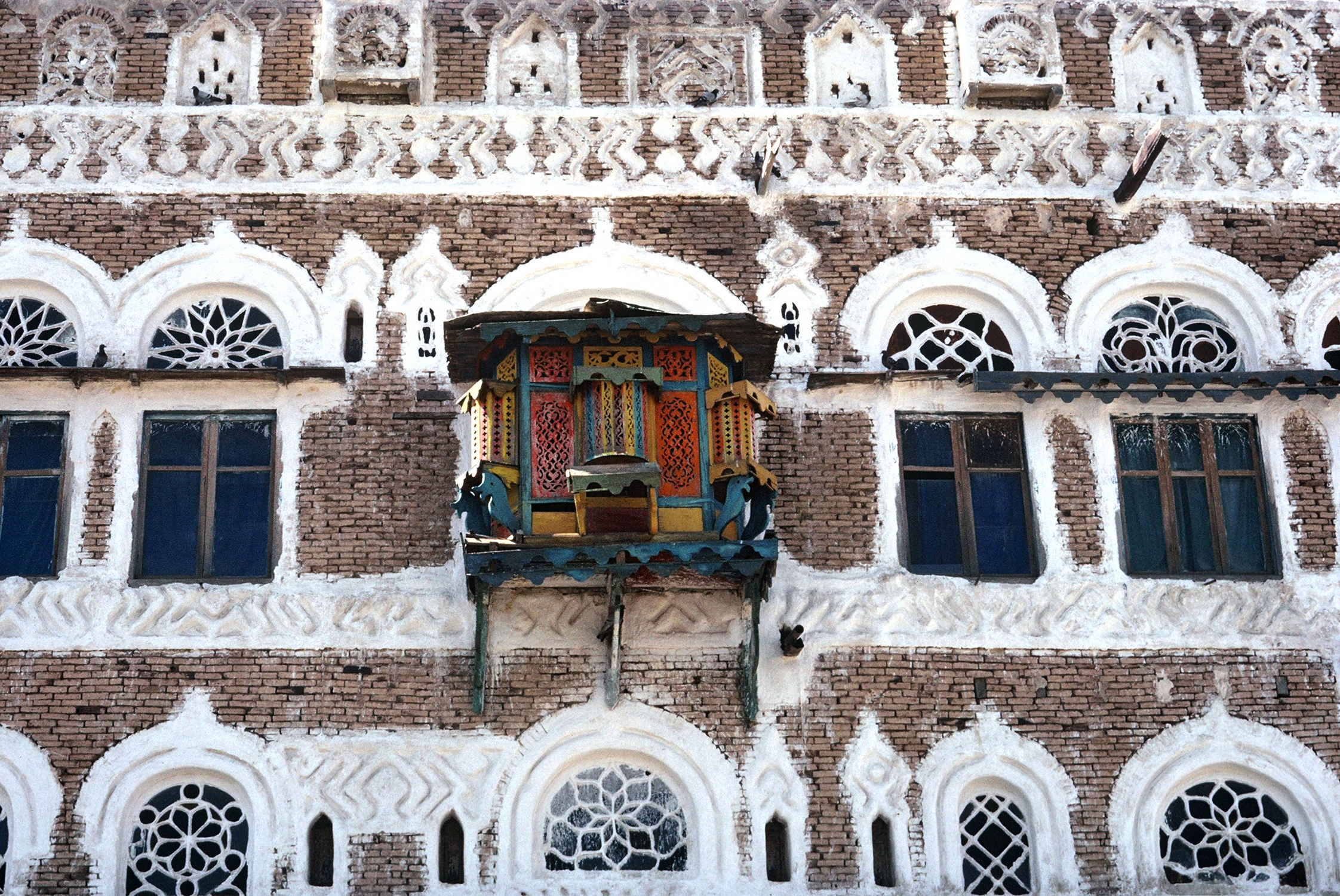 L'ancien palais de l'Imam à Taez avec ses typiques décorations de stuc et une moucharabieh peinte de couleurs vives.